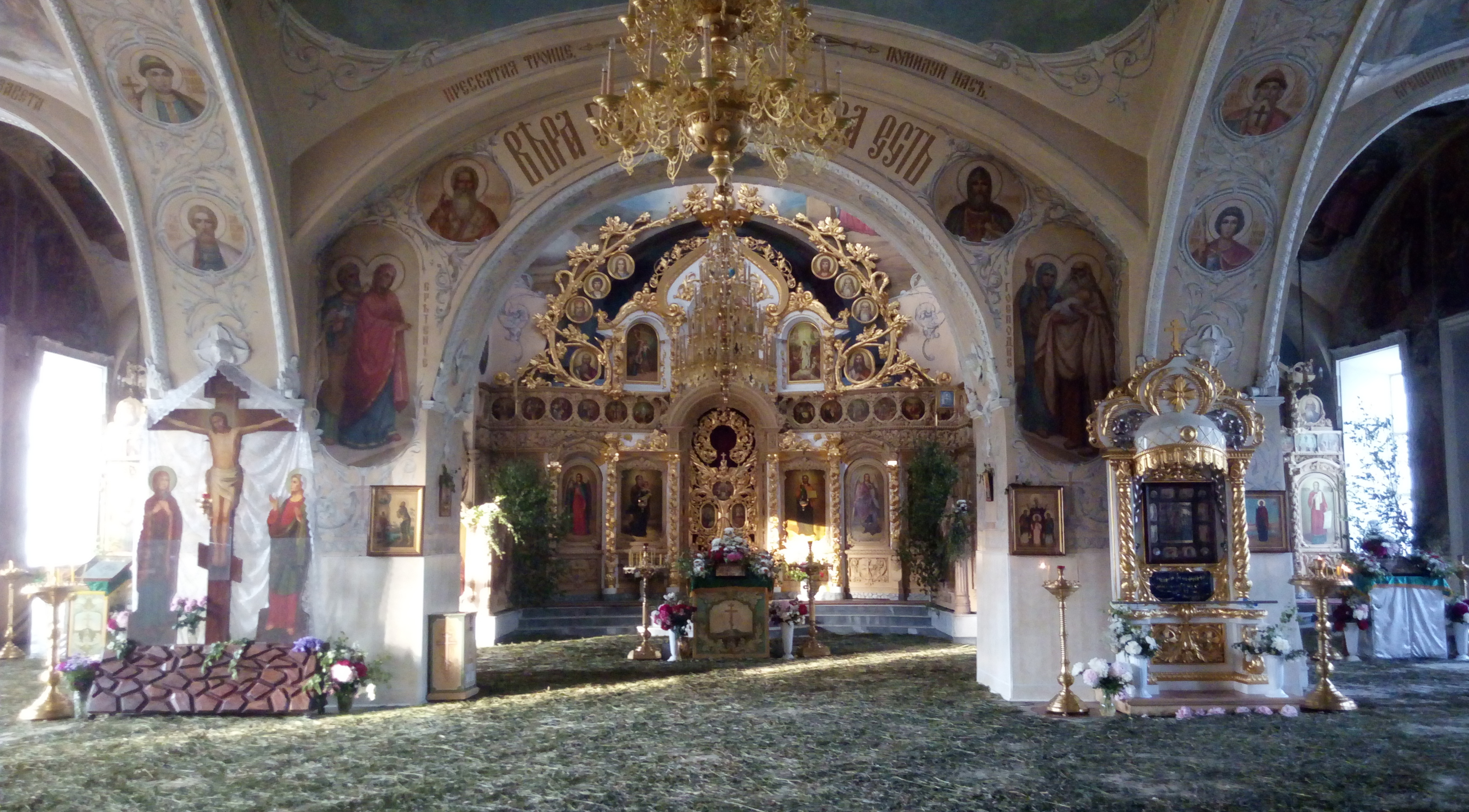 Interior of Epiphany Cathedral, Oryol, Russia. The floor is covered with green birch branches — a Trinity Sunday tradition. Интерьер Богоявленского собора, Орёл, Россия. Пол покрыт берёзовыми ветками — традиция на день Святой Троицы.